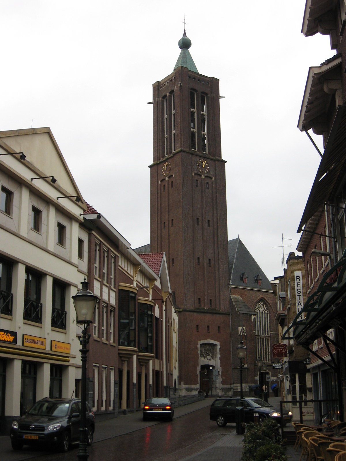 Venlo